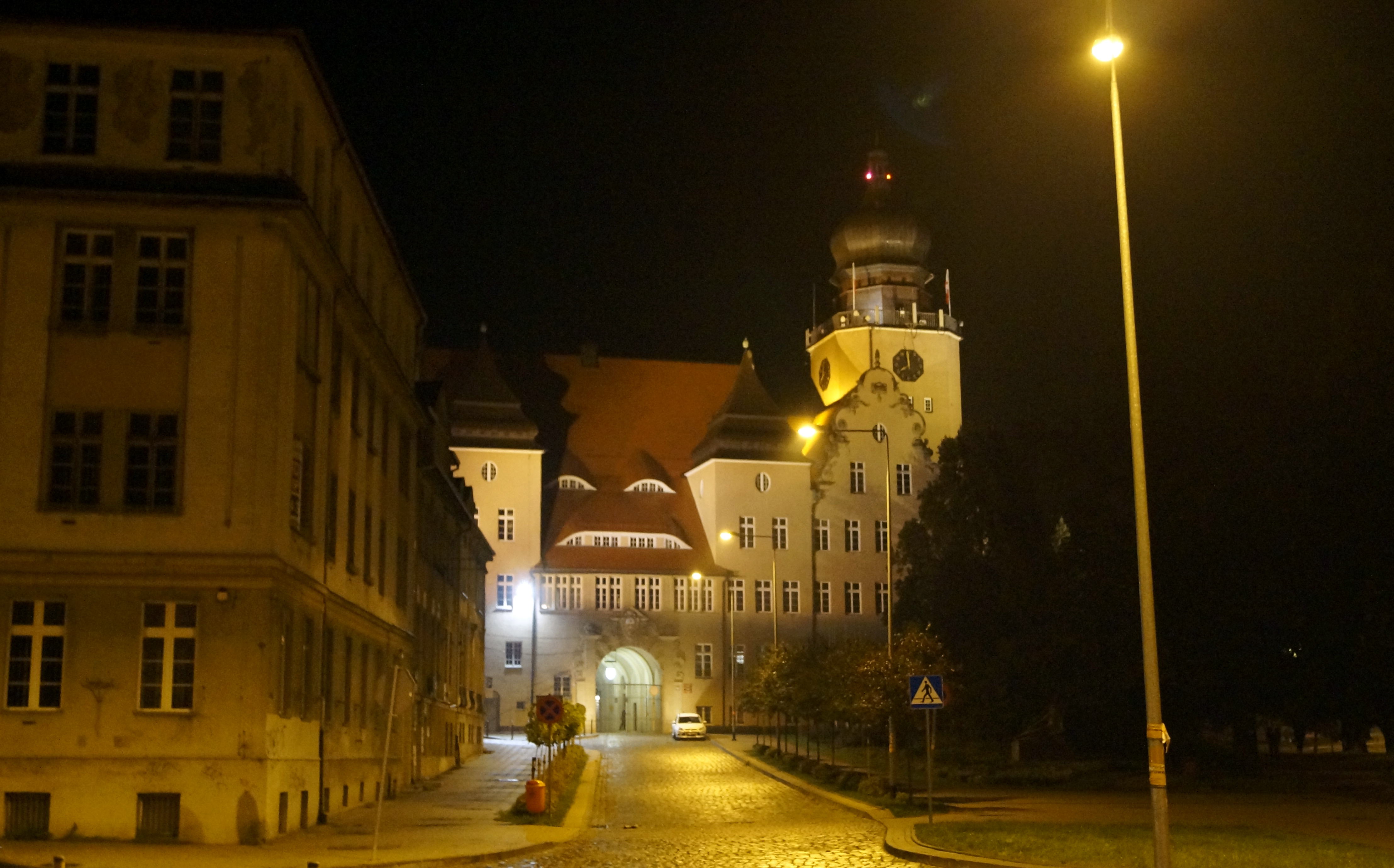 Elbląg - budynek Urzędu Miasta